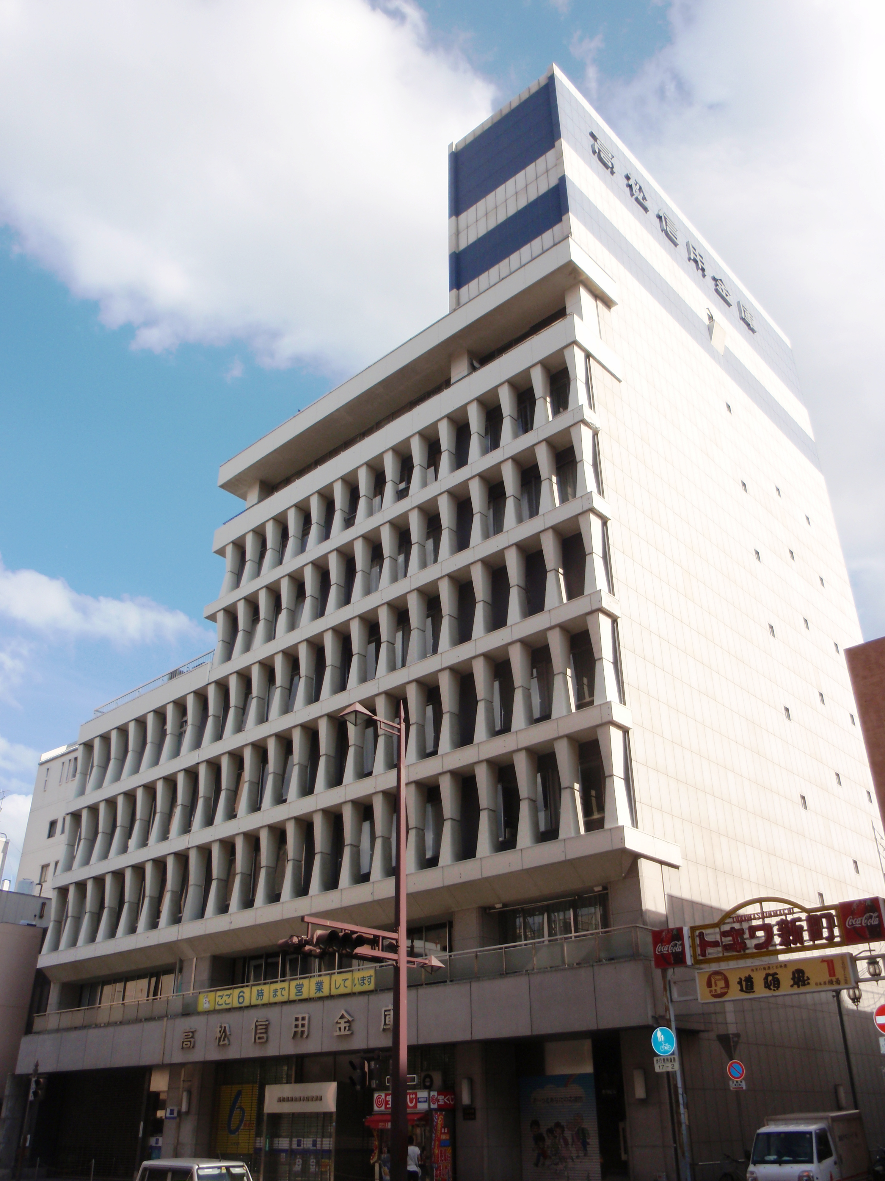 香川県高松市瓦町にある高松信用金庫本店。